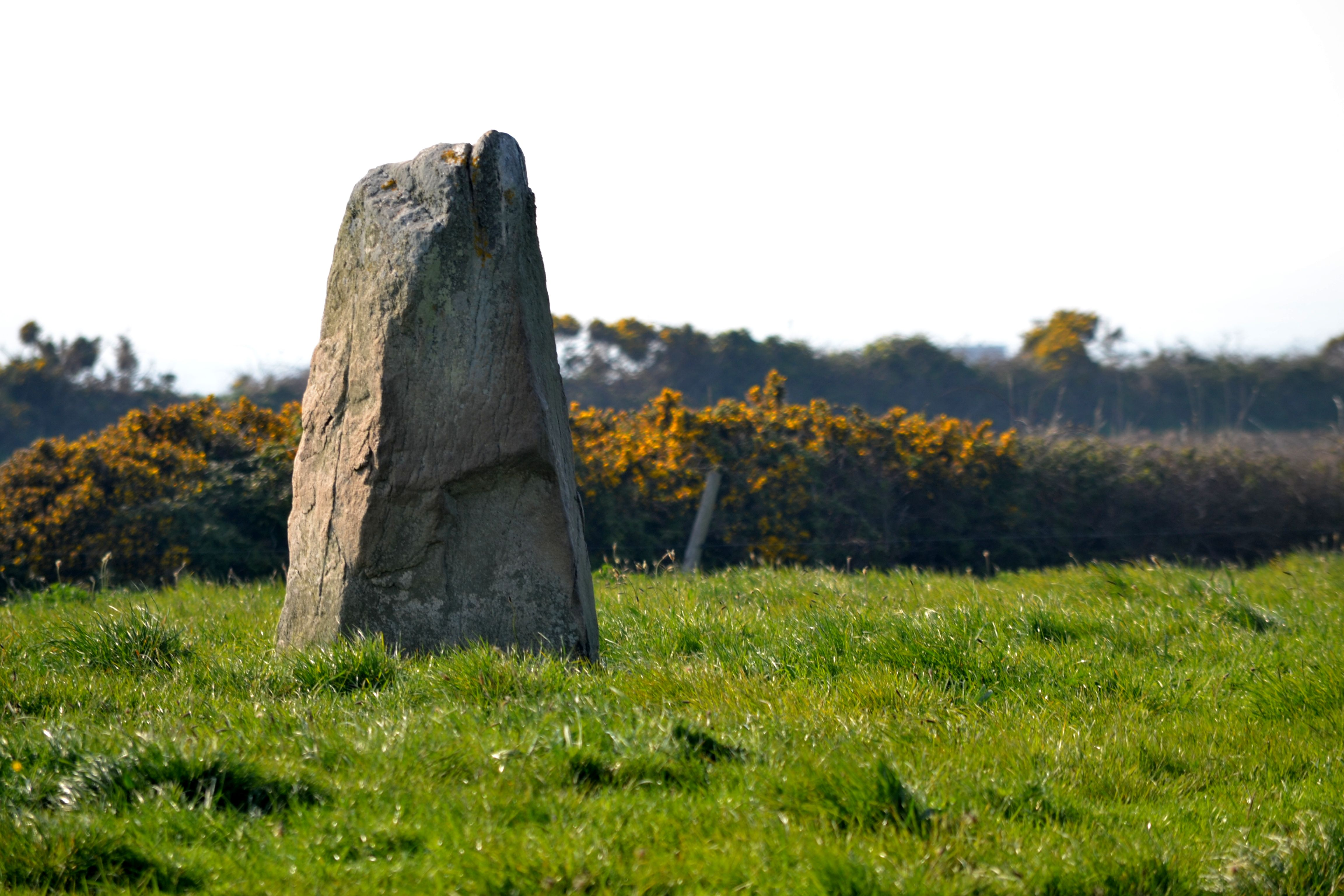 Menhir de la Bergerie de Étennevaux à Saint-Germain-des-Vaux (50).